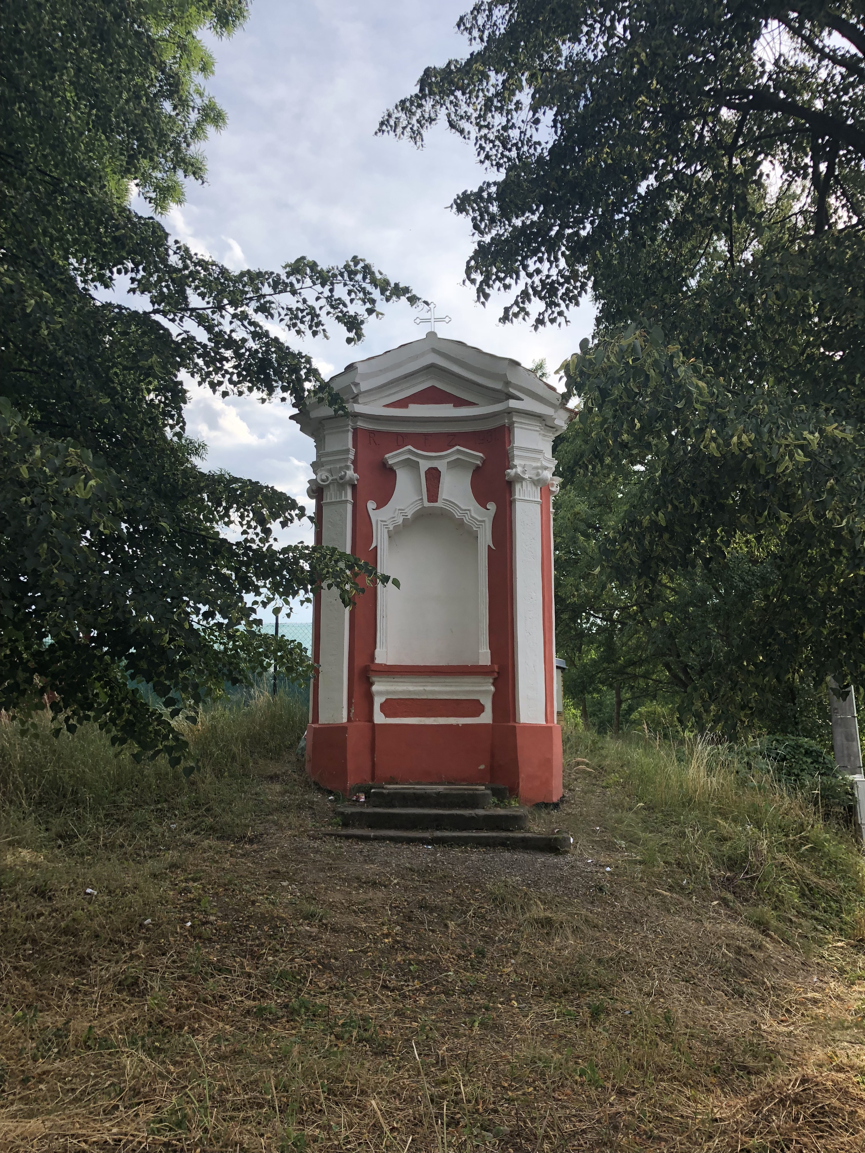 Výklenková kaple Panny Marie v Doksanech v potoka Čepele